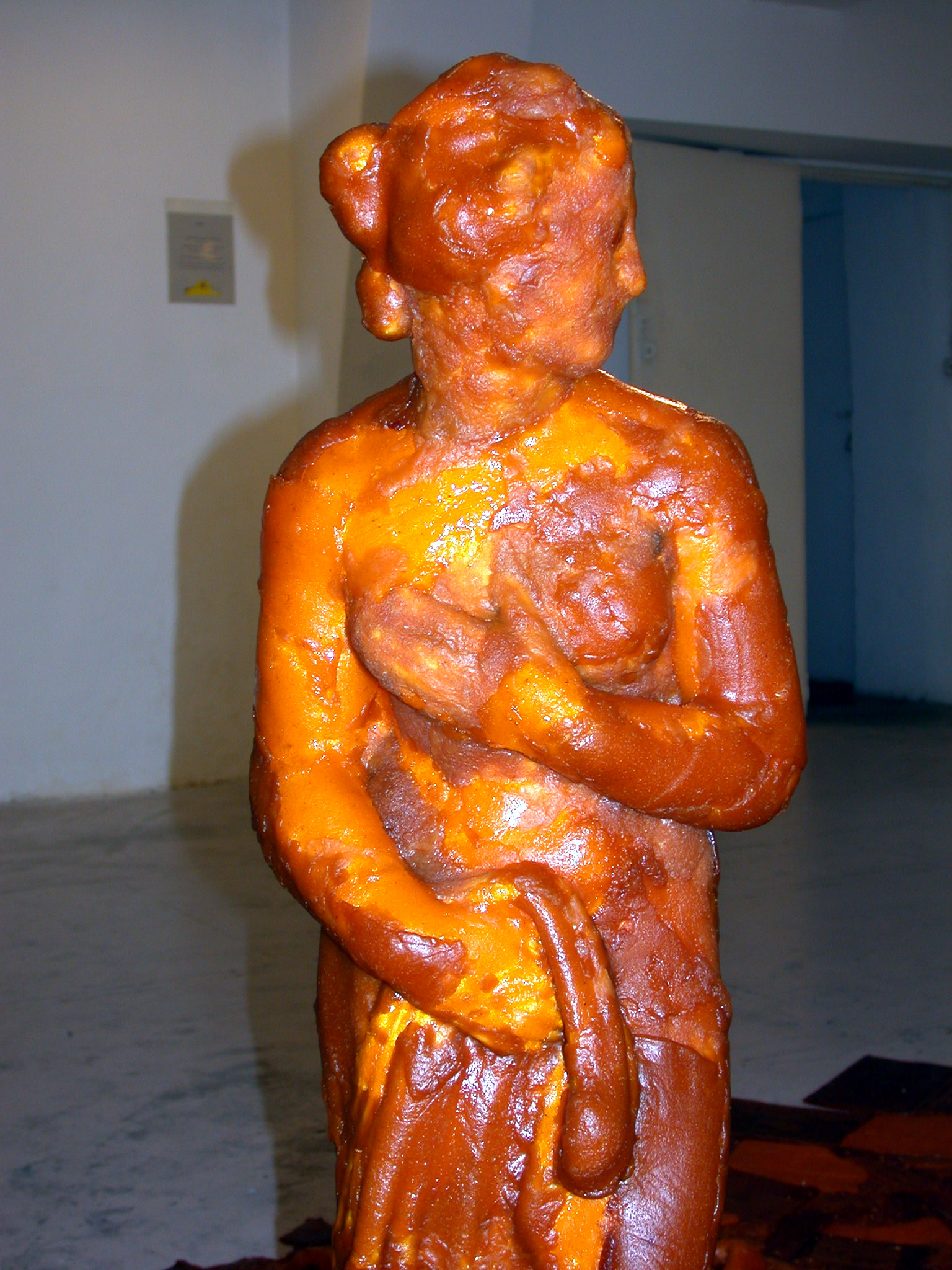 עבודה של גליה יהב